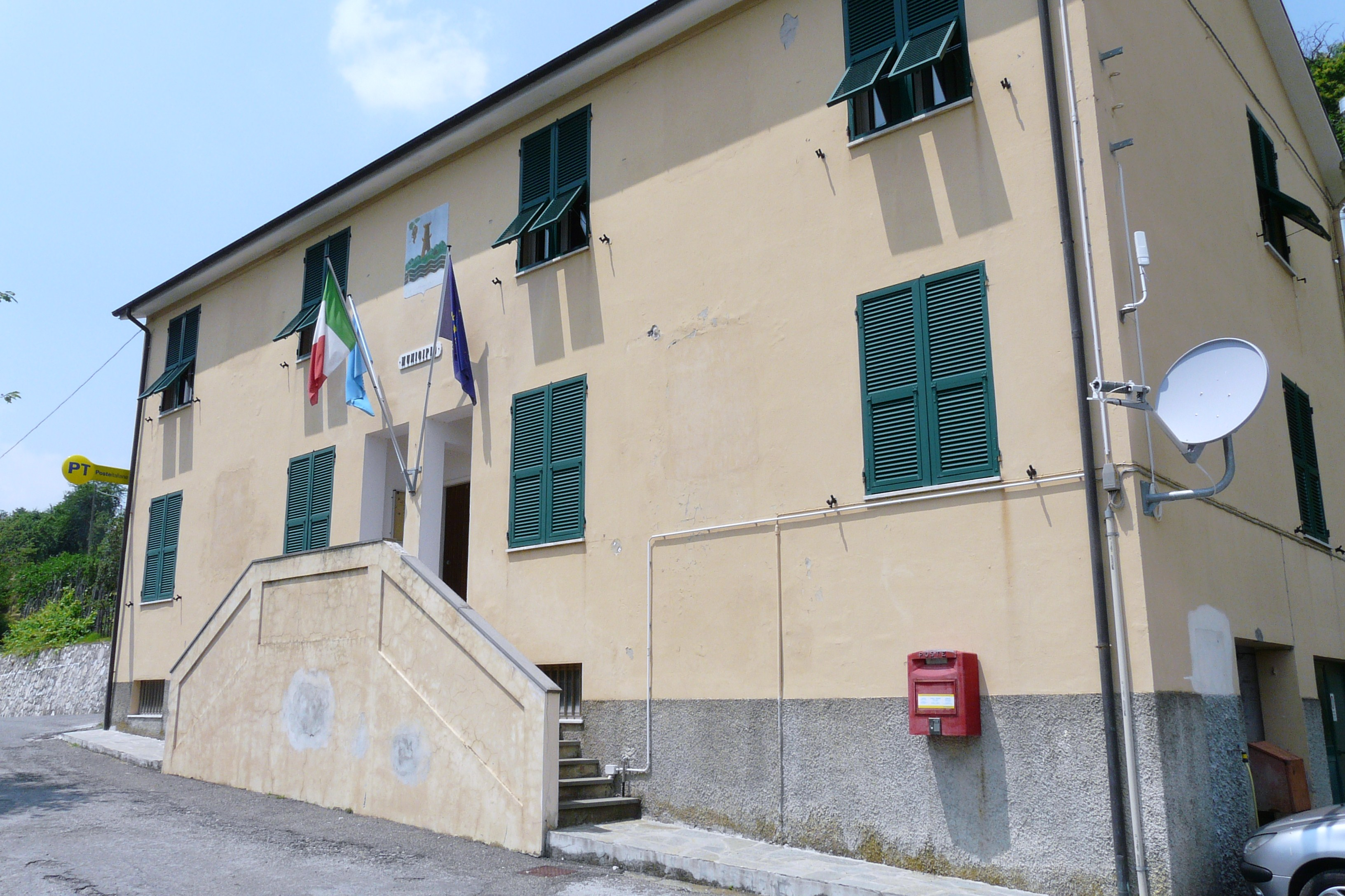 Municipio di Maissana, Liguria, Italia